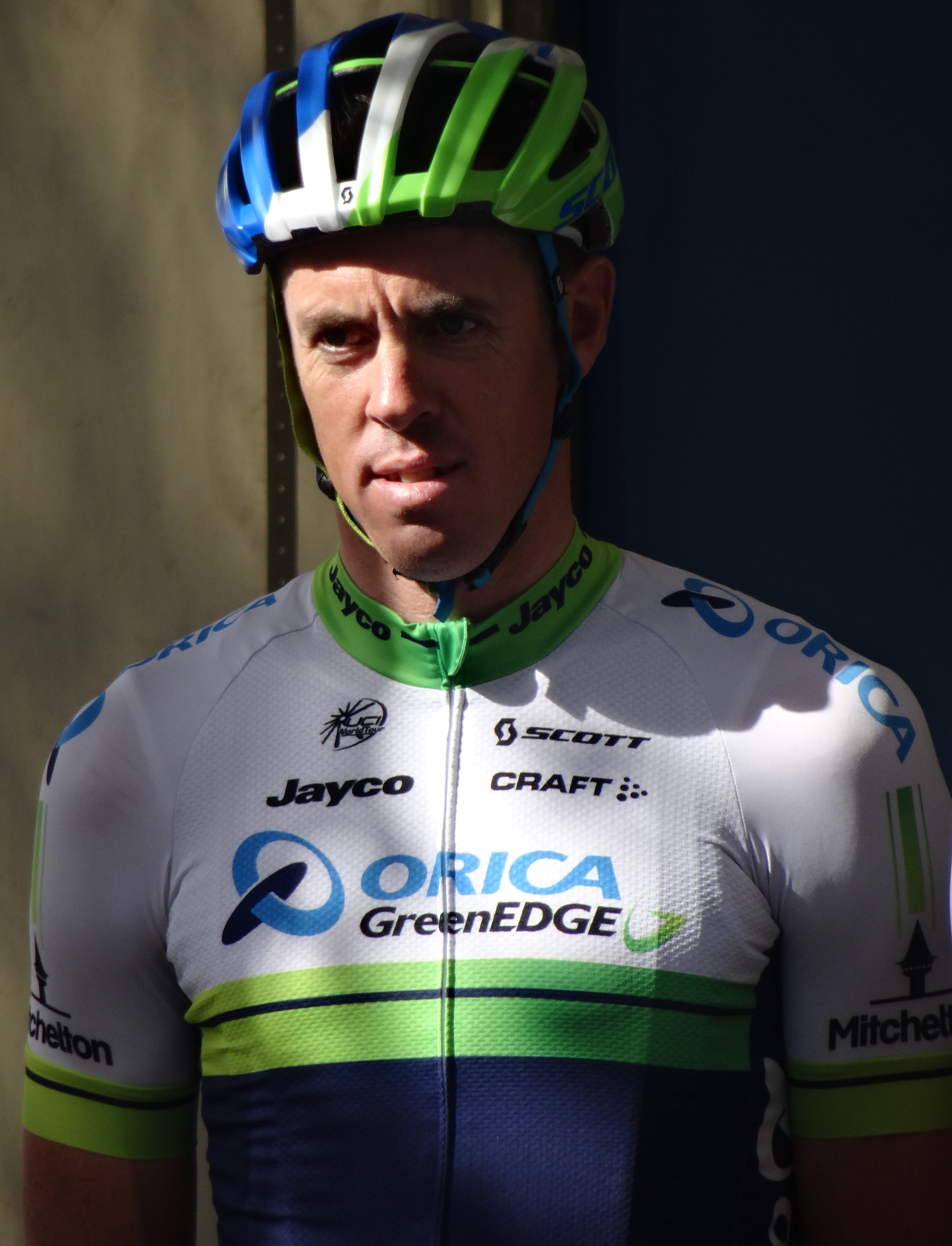 Reportage photographique réalisé le jeudi 2 octobre à l'occasion du départ de la première étape de l'Eurométropole Tour 2014 à La Louvière, Belgique.